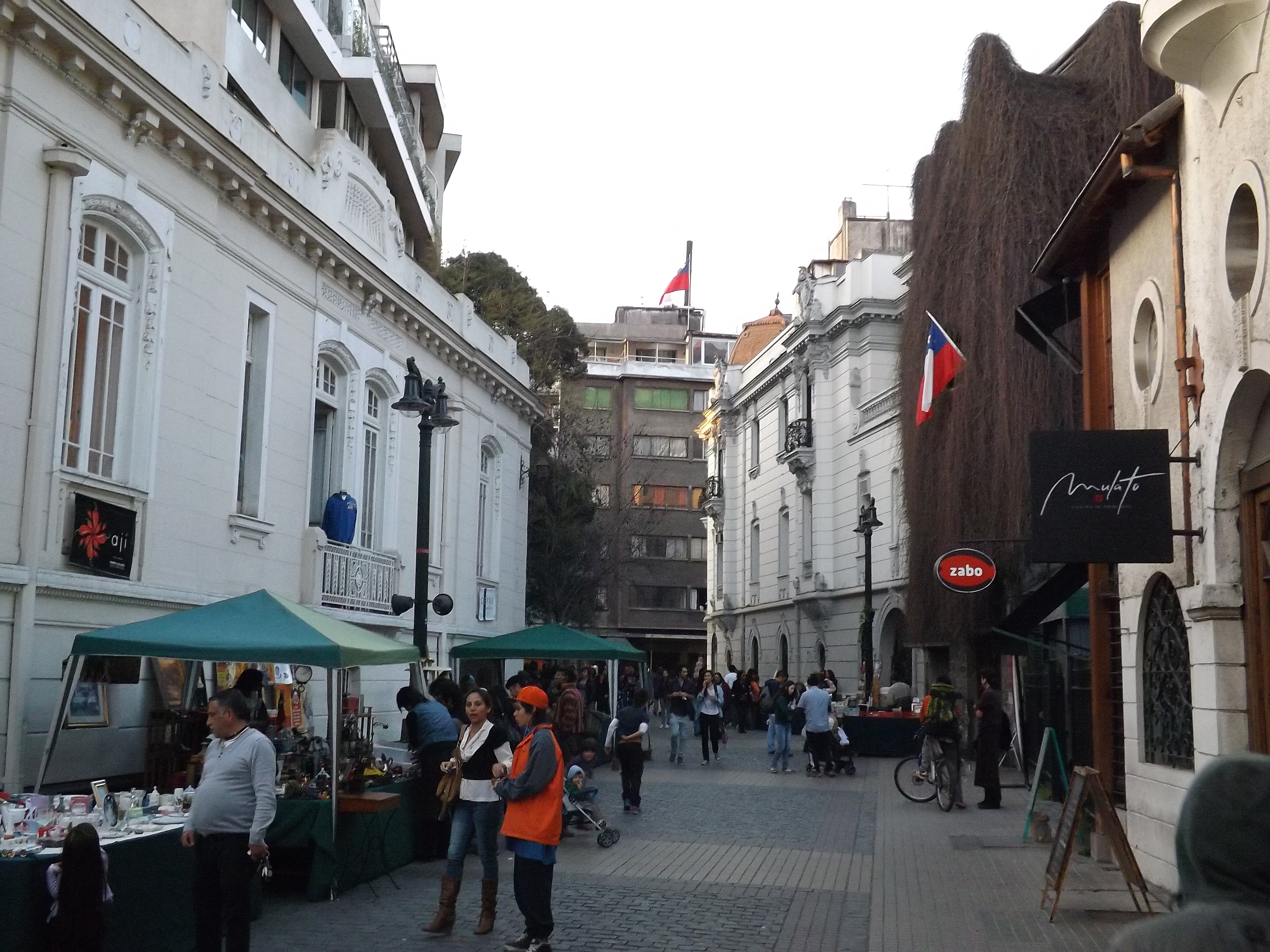 Barrio Lastarria This is a photo of a national monument in Chile: 417